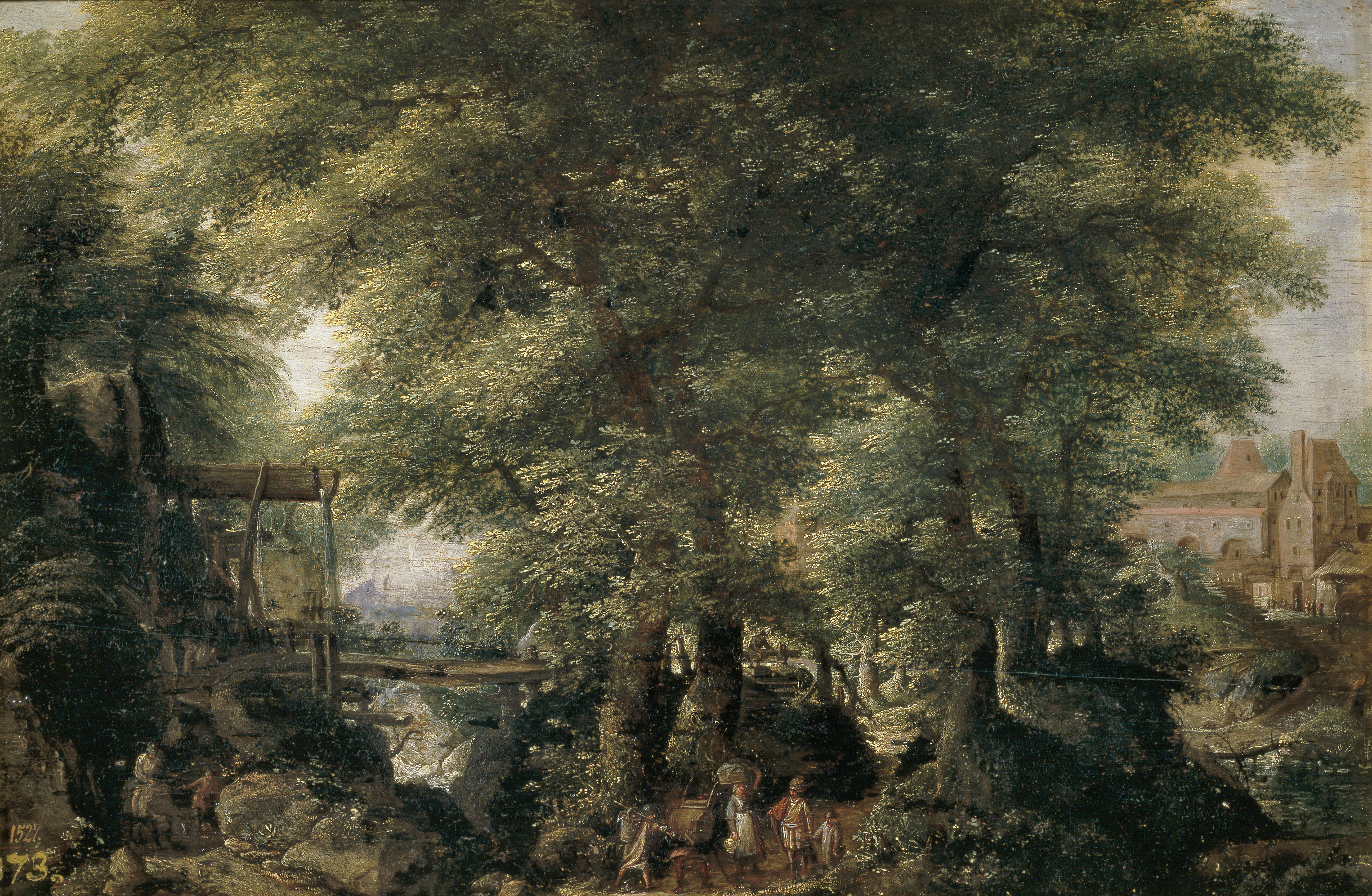 Paisaje frondosolabel QS:Les,"Paisaje frondoso"